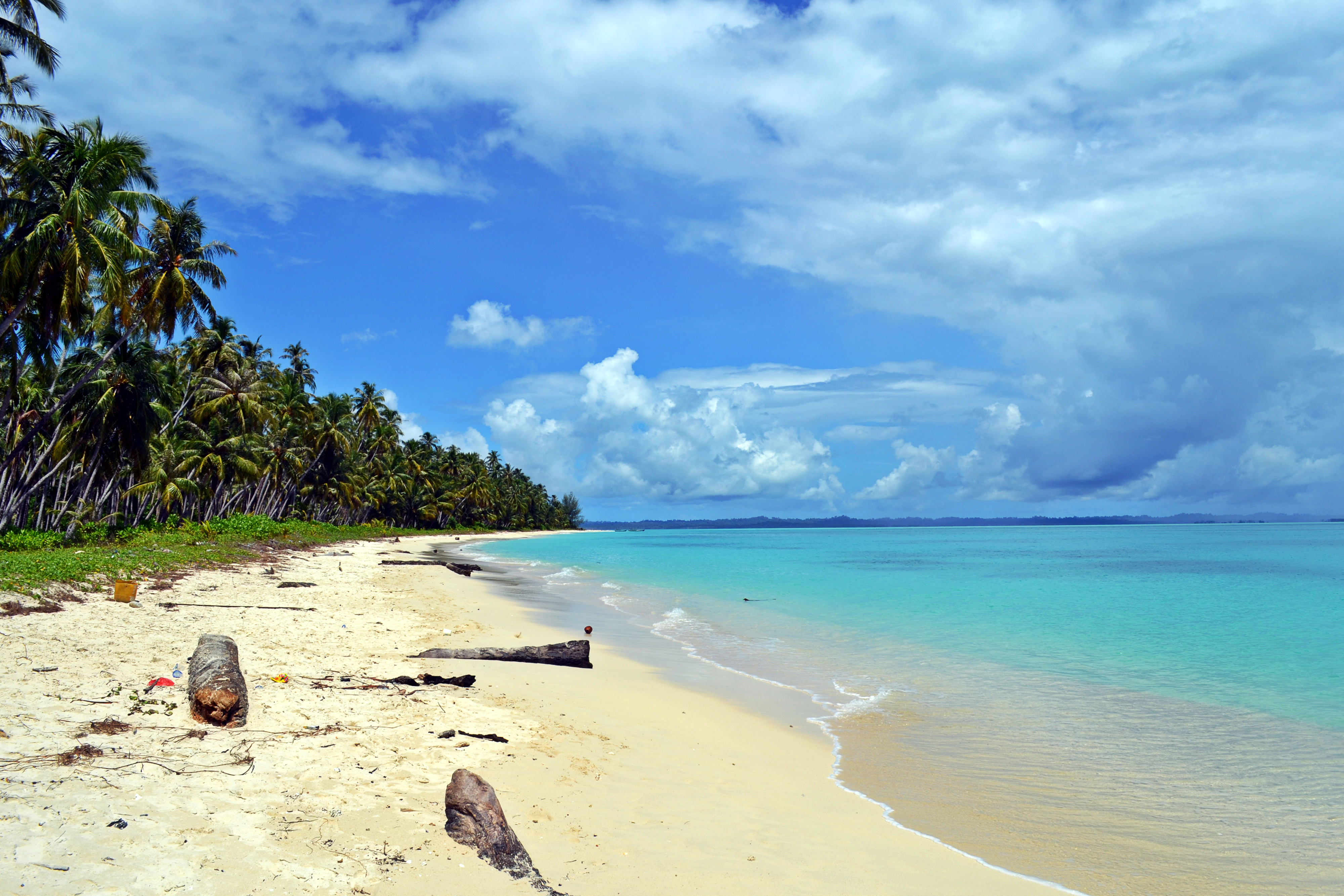 Palambak Island